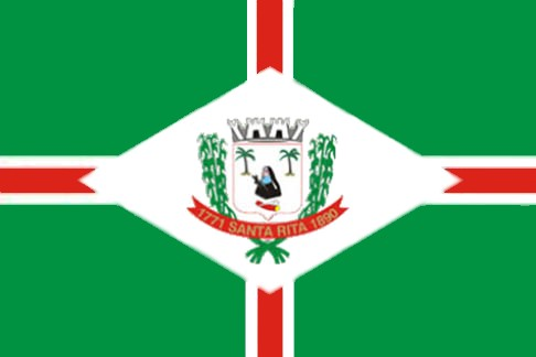 Bandeira do município de Santa Rita-PB.